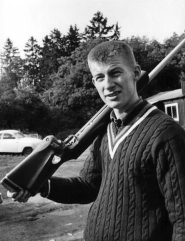 Sven Johansson